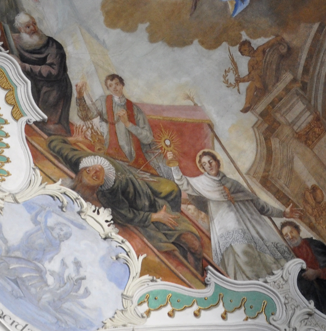 Bad Schussenried, Pfarrkirche St. Magnus (ehemalige Klosterkirche) Hauptfresko mit Szenen aus dem Leben des hl. Norbert von Xanten von Johannes Zick, 1745 (N7) Der Kampf Norberts gegen den Irrlehrer Tanchelm